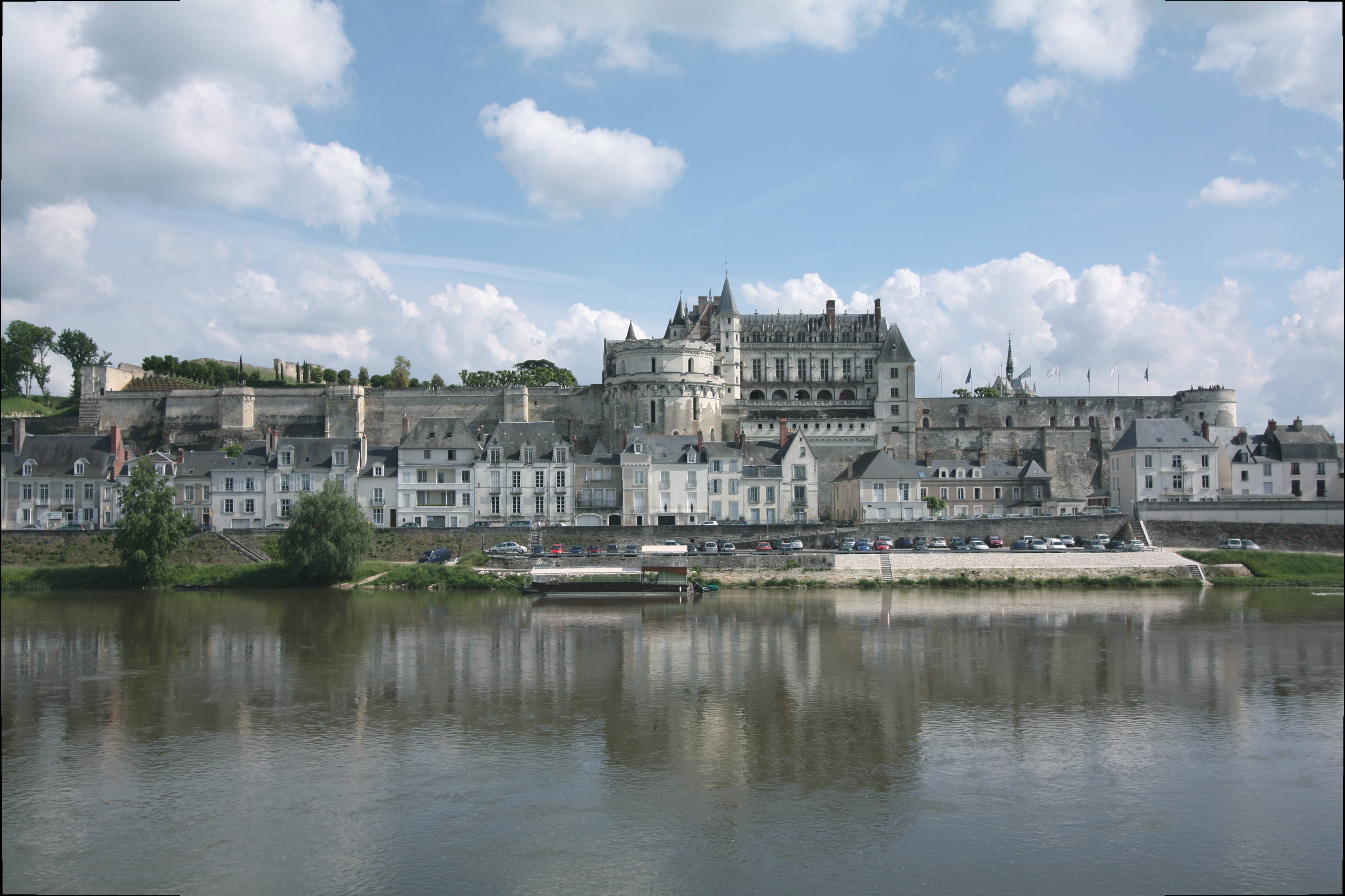 Schloss Amboise in der Loire-Stadt Amboise im Département Indre-et-Loire/Frankreich.